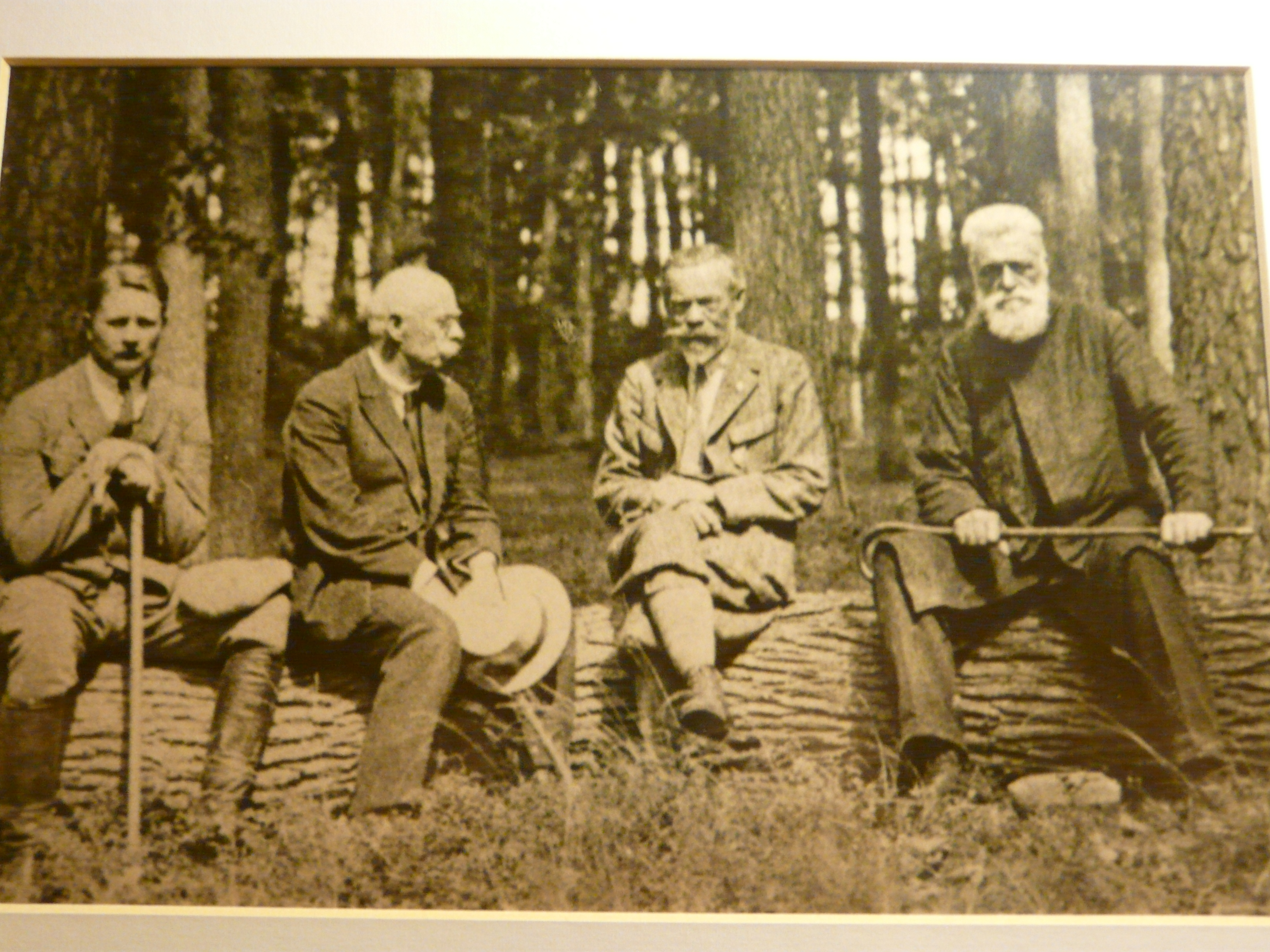 Zakopane. Zespół dworsko-parkowy w Kuźnicach, okolice i wnętrza. Hrabia Władysław Zamoyski w lasach kórnickich